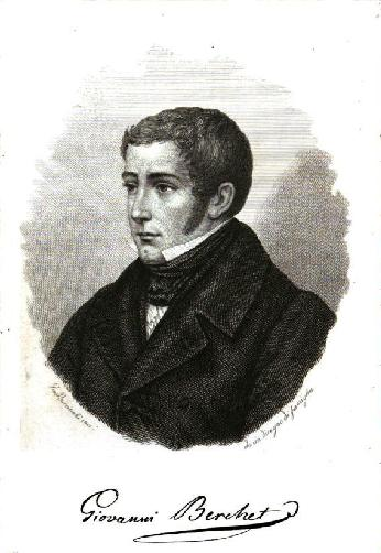 Giovanni Berchet, scrittore italiano